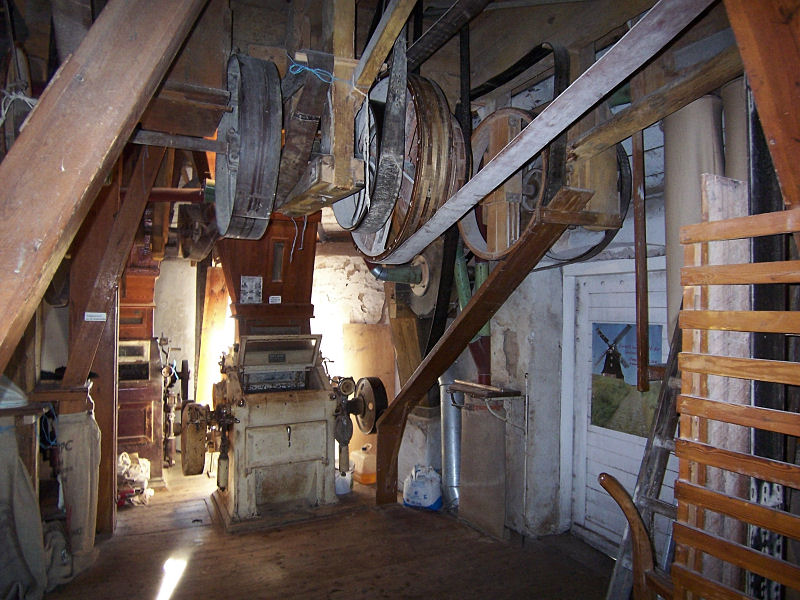 Erdholländer in Stove, Transmissionswelle und Sichter (?)